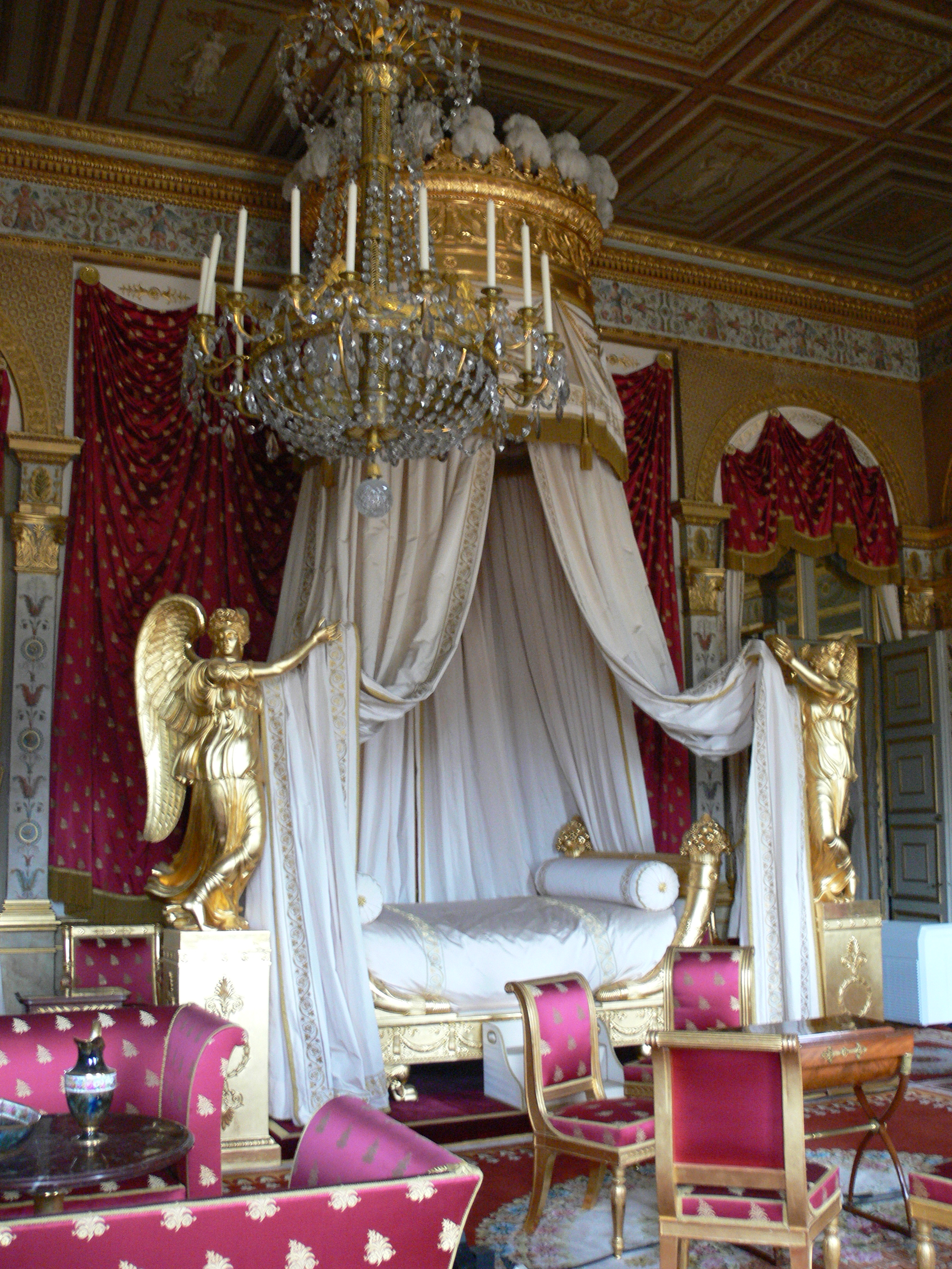 Compiègne, France: Château de Compiègne Les appartements historiques Chambre de l’impératrice Marie-Louise (Premier Empire), 1811 Lit de travers en bateau d'époque Empire Furniture by Jacob-Desmalter